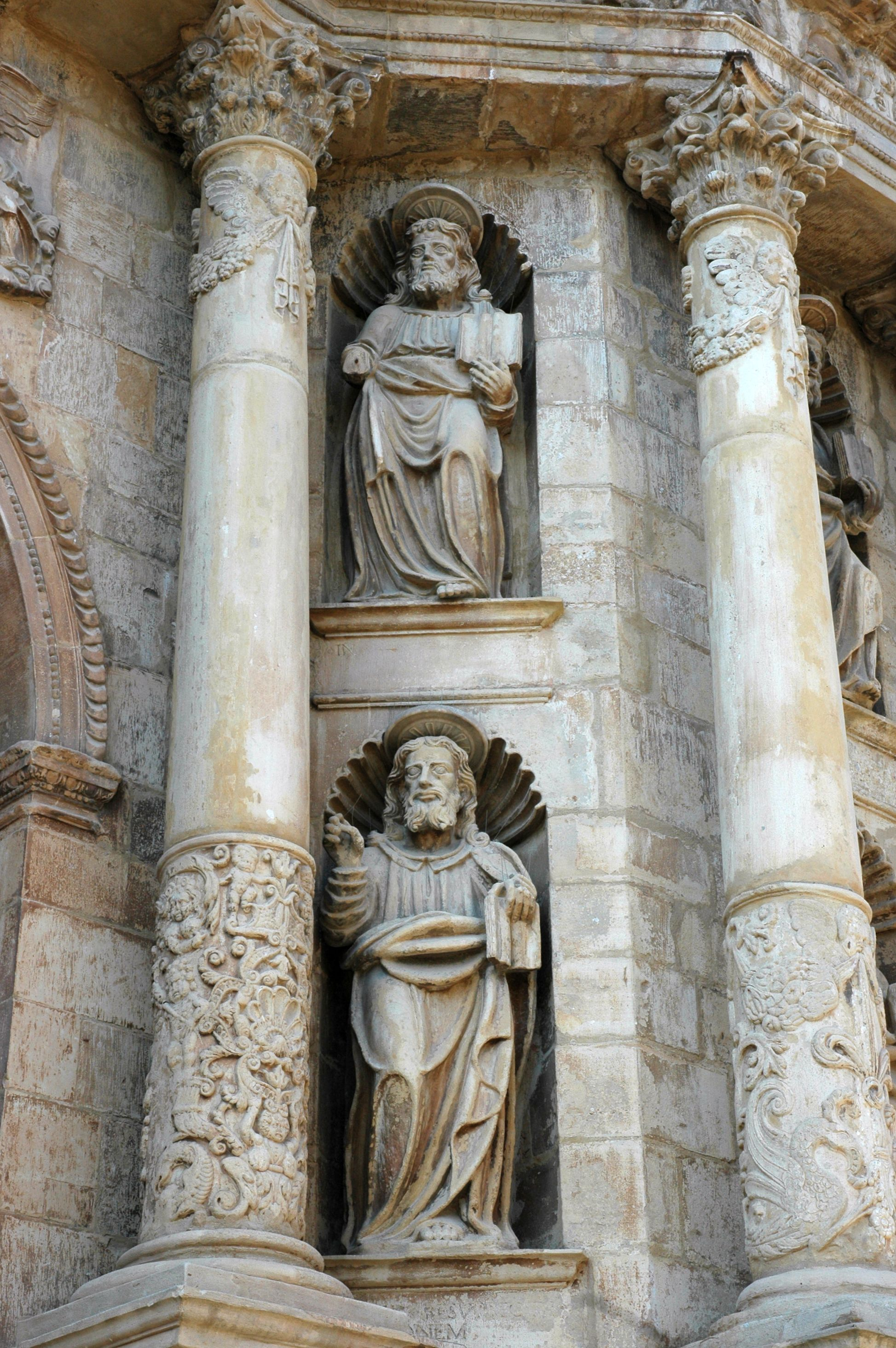 Santa Maria de Montblanc - Detall portalada